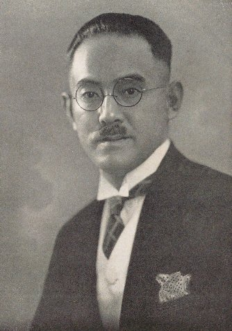 松田正之（1892-1976）